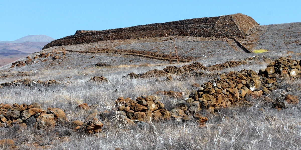 Пуукохола-Хеиау